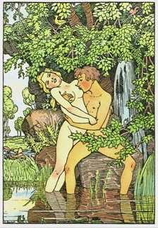 Книга Маркизы